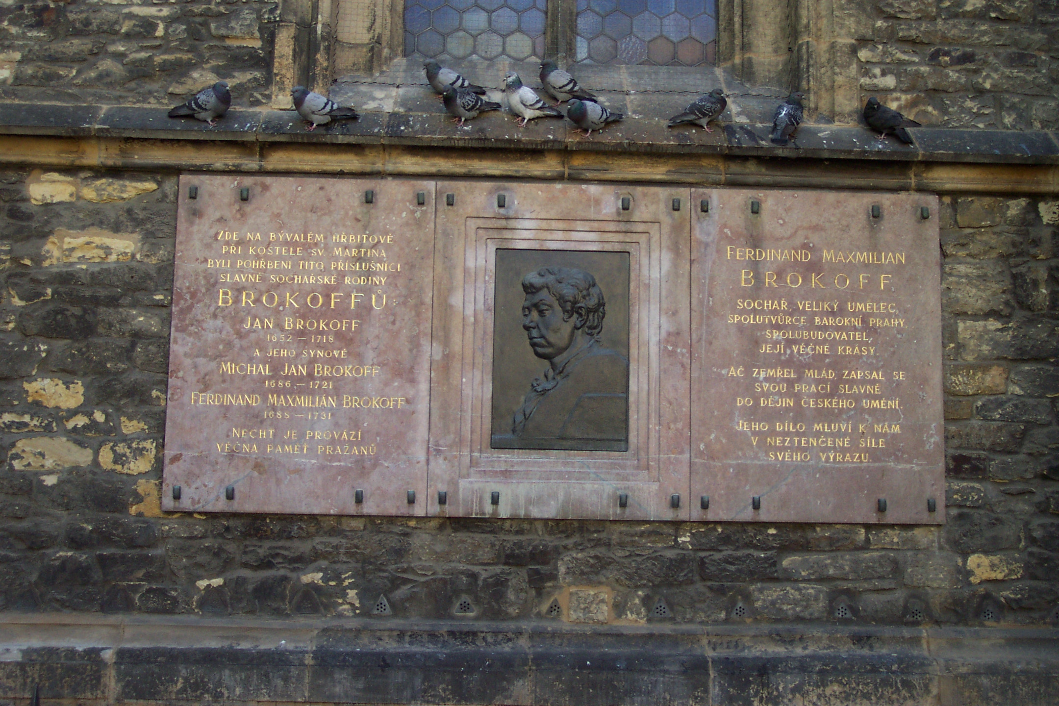 Prague, Staré město, Brokof's tomb - Praha, Staré město, Brokofův hrob a pamětní deska